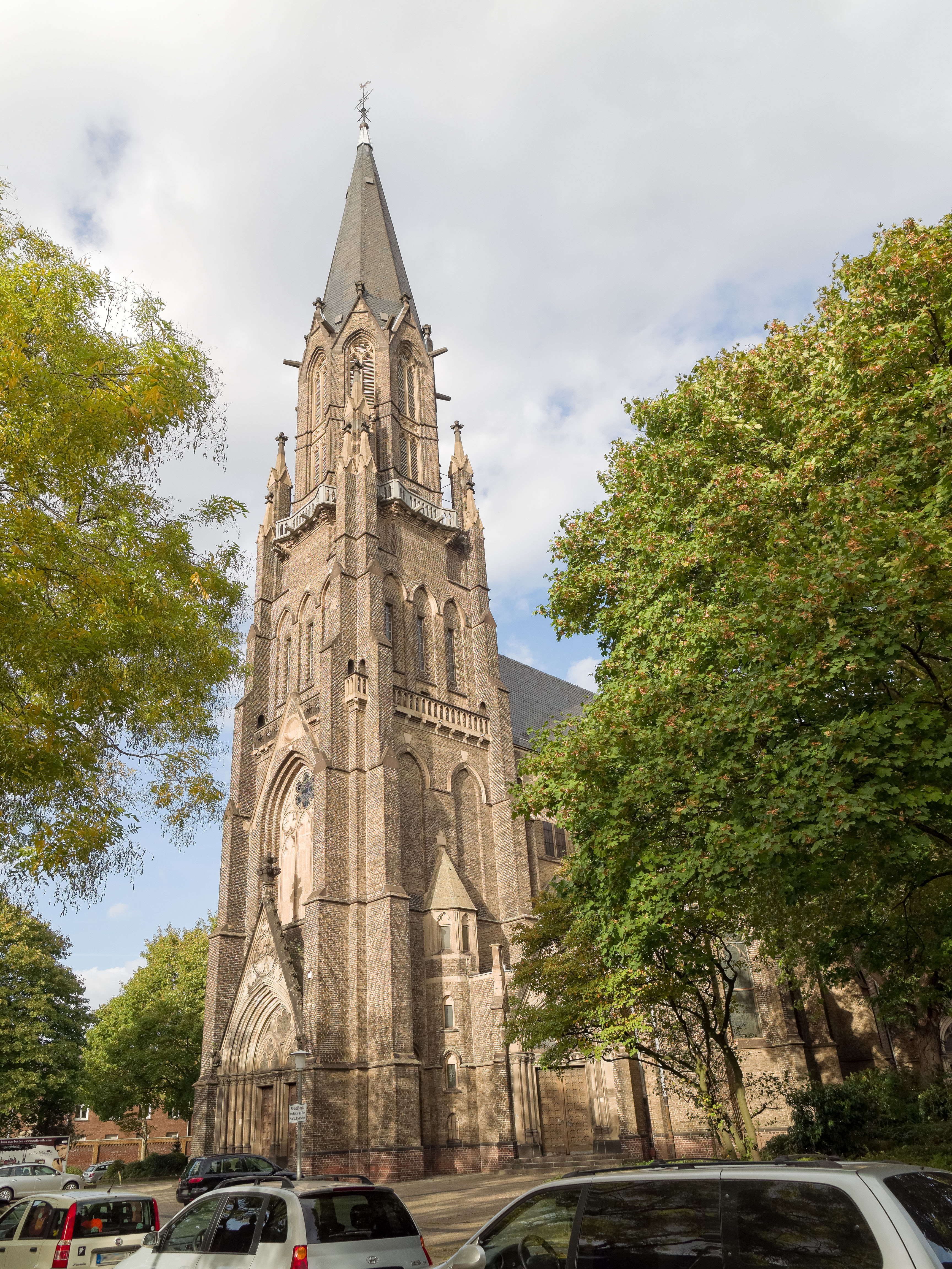 Krefeld Denkmal 104: Katholische Pfarrkirche St. Johann Baptist